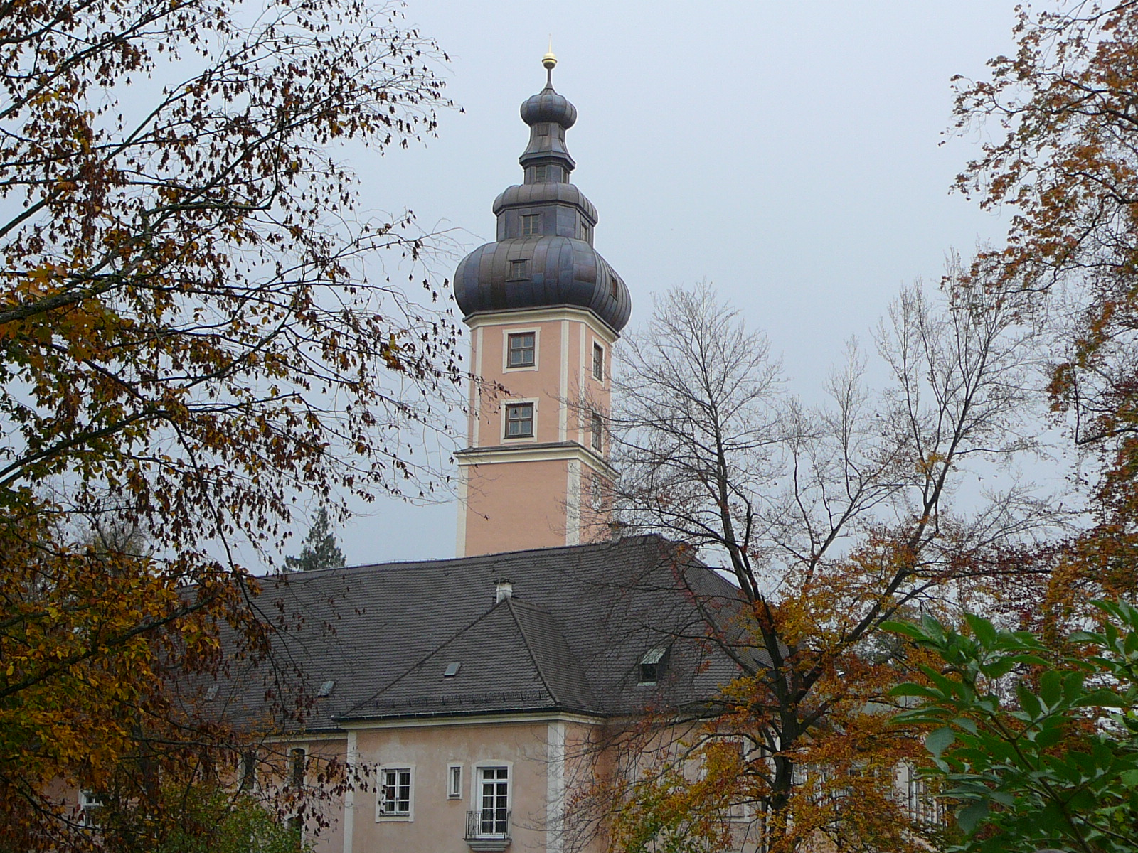 Kirchturm vom Schloss Planegg